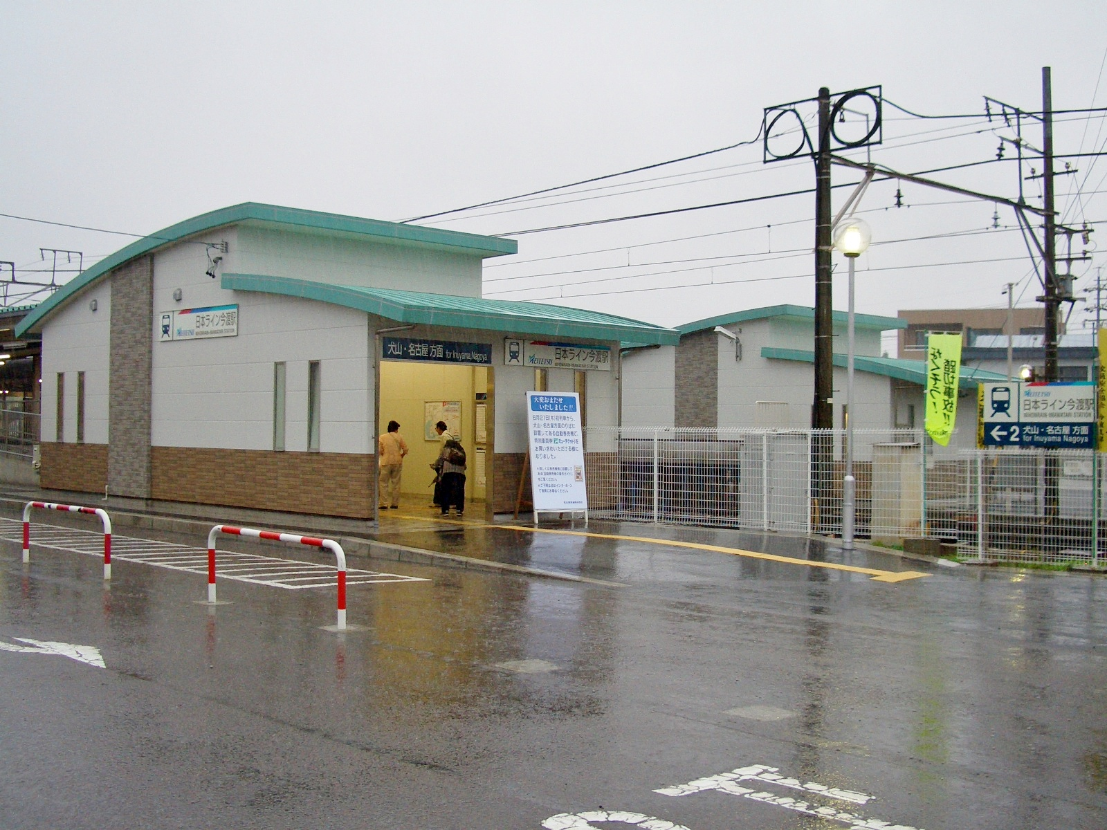 名古屋鉄道広見線日本ライン今渡駅犬山･名古屋方面駅舎。奥（右）は新可児・御嵩方面駅舎。